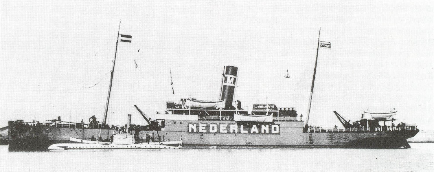 SM UB-6 interniert in Holland im Hafen von Hellevoetsluis